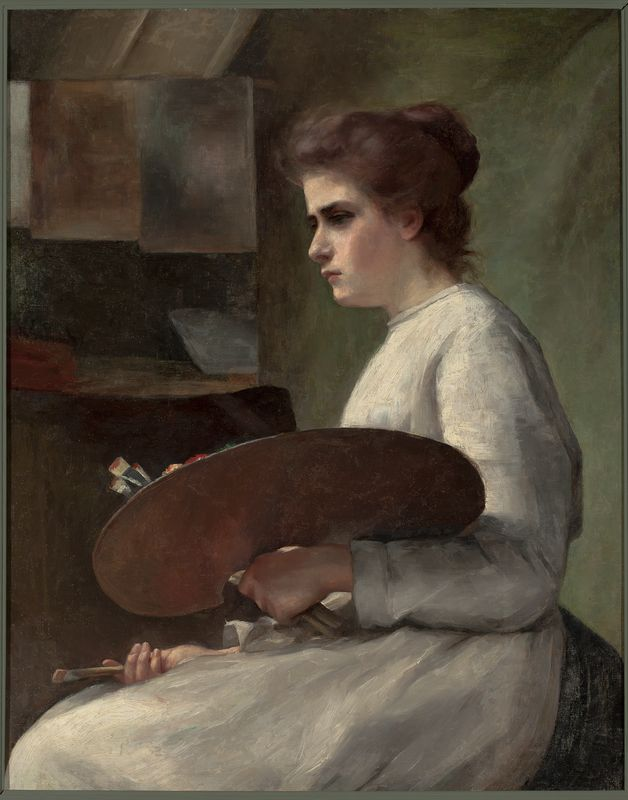 Self-portrait